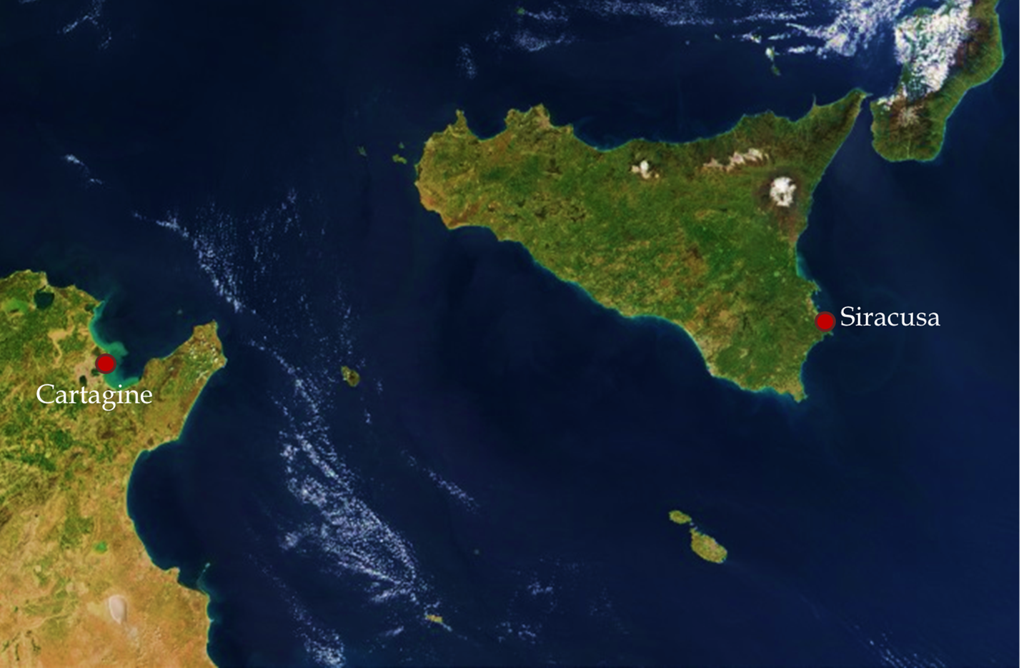 Localizzazione di Siracusa e Cartagine. Immagine originale della Nasa già su Commons.